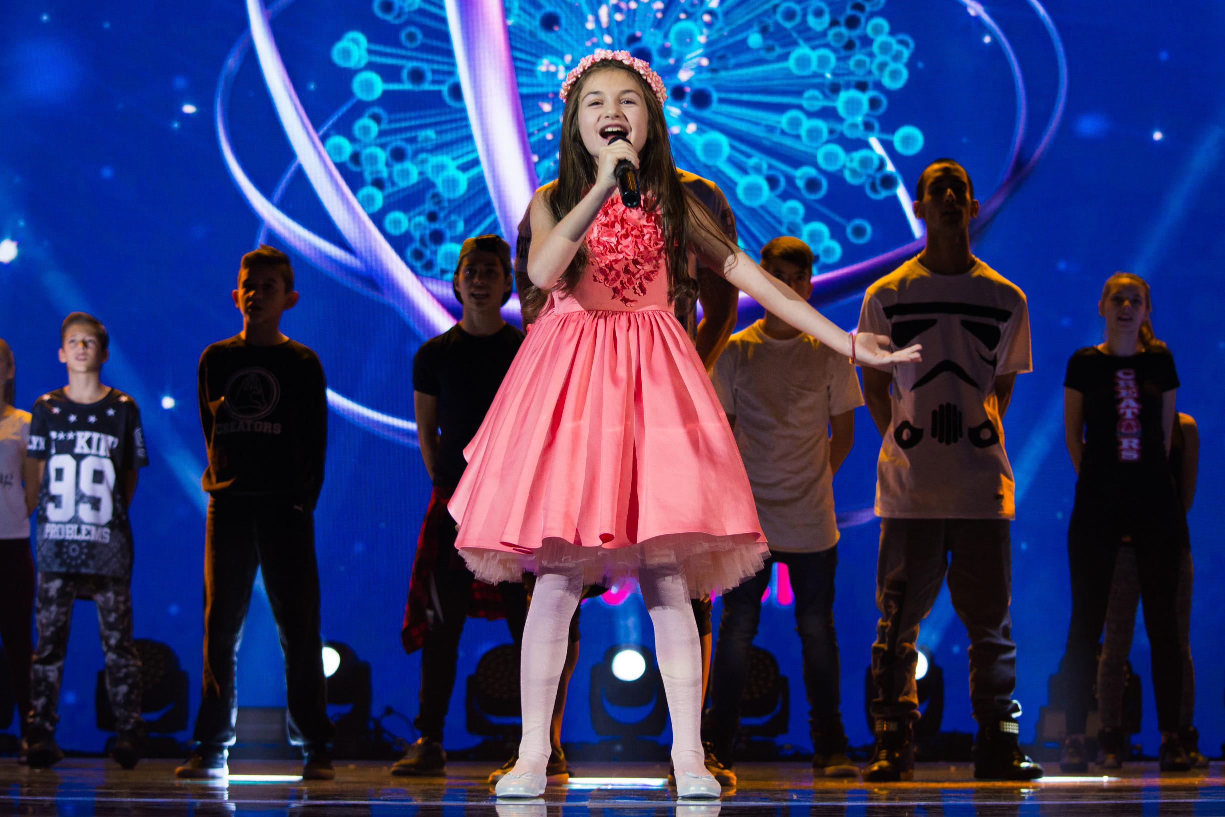 Крисия Тодорова на церемонии открытия Детского Евровидения 2015